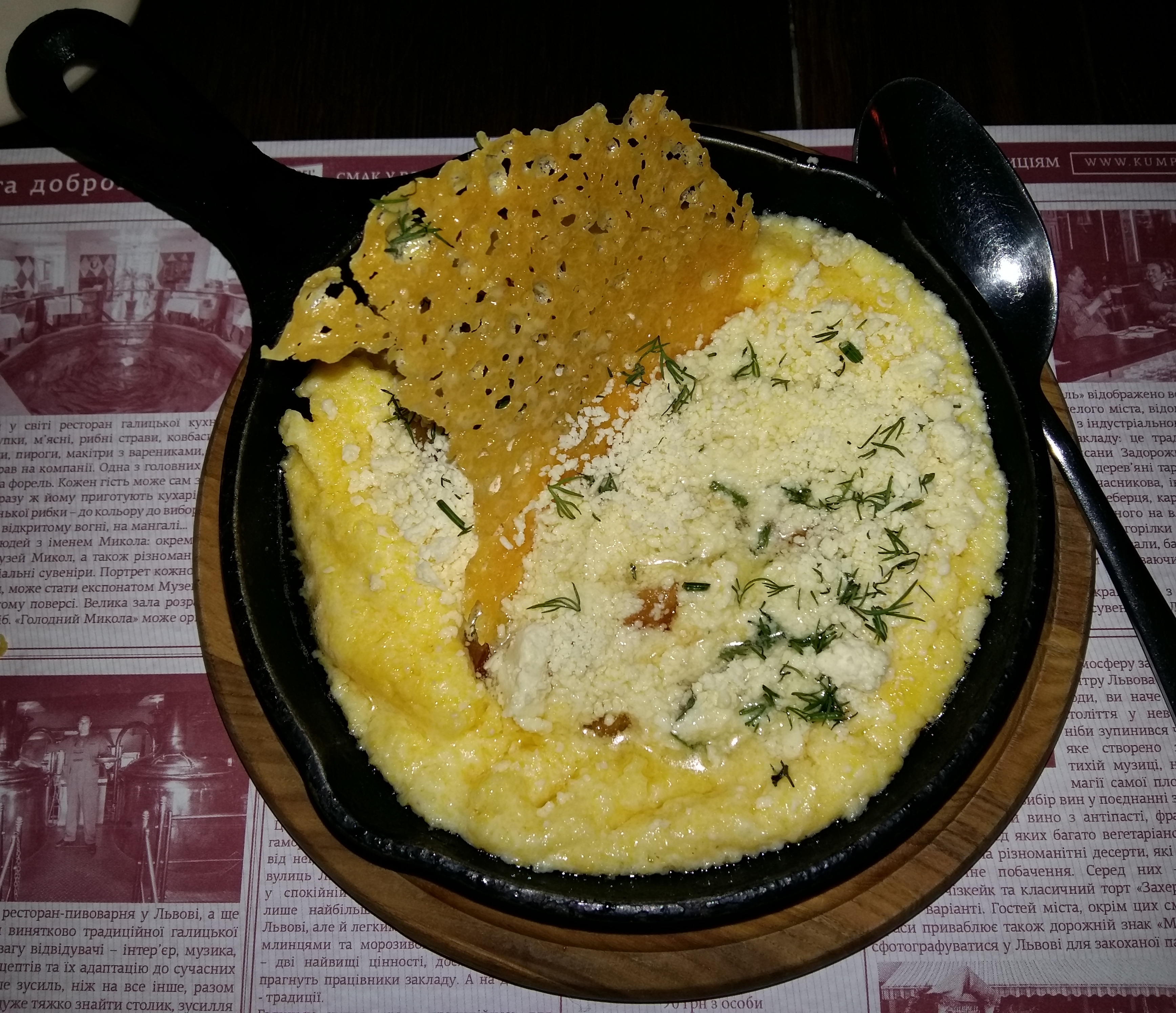 Banusz (banosz) w restauracji-piwowarni "Kumpel" we Lwowie (ul. Volodymyra Vynnychenka 6).